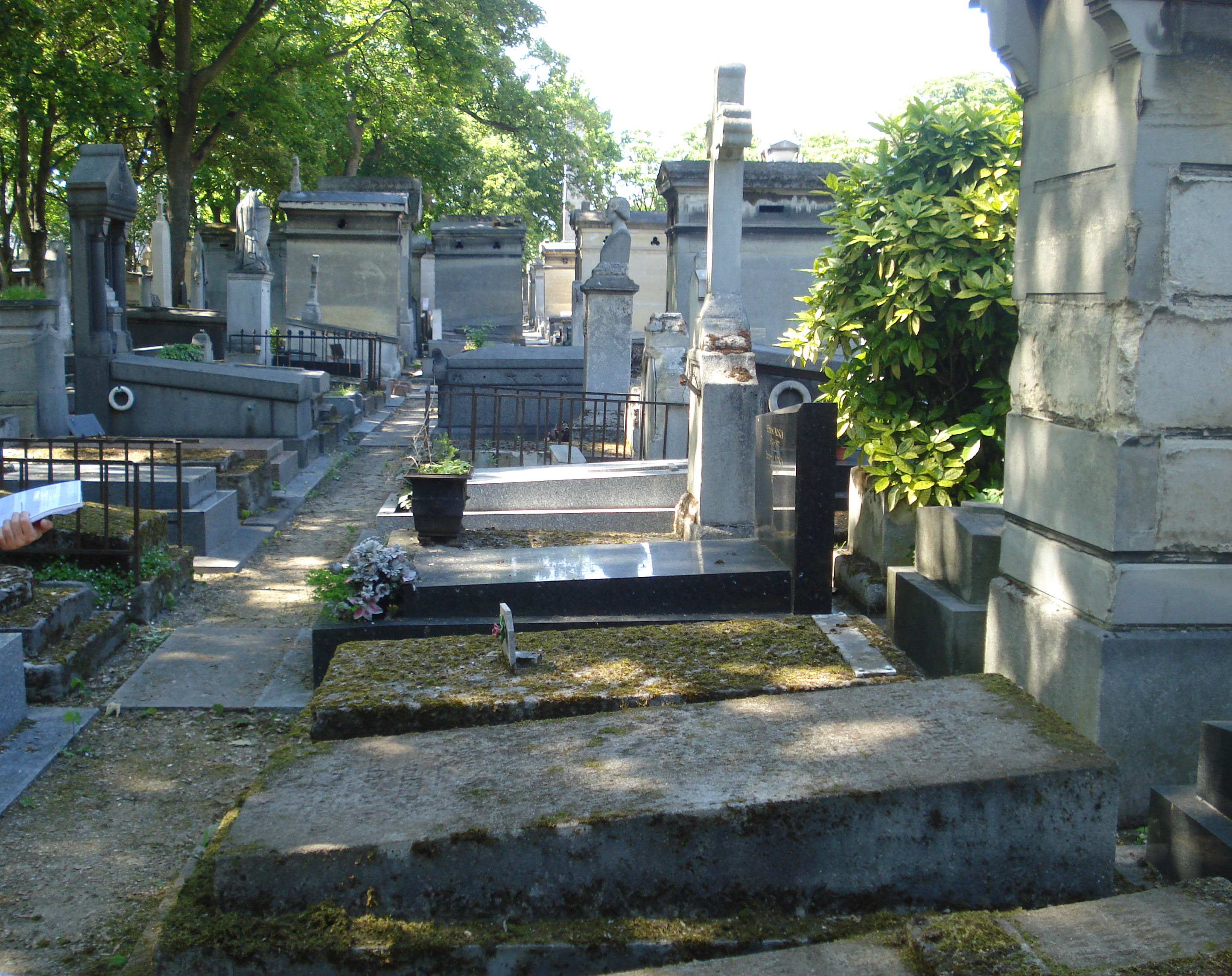 Clara Adèle Luce Herpin, nom de plume Lucien Perey (ou Lucien Pérey), née à Carouge, en Suisse, le 15 mars 1825, décédée le 11 avril 1914 à Paris, où elle est venu habiter en 1853, est une écrivaine et historienne française d'origine suisse. Elle est inhumée avec ses parents, son père le docteur Théodore Herpin (1799-1865) qui a laissé un nom pour ses travaux sur les maladies nerveuses. La tombe est dans la 28e division, avenue de la Croix, la tombe est sur la même ligne que le monument du baryton Paul-Bernard Barroilhet, (monument avec un buste), 7e tombe à droite, (il y a trois tombes très anciennes cote à cote, c'est celle du milieu).